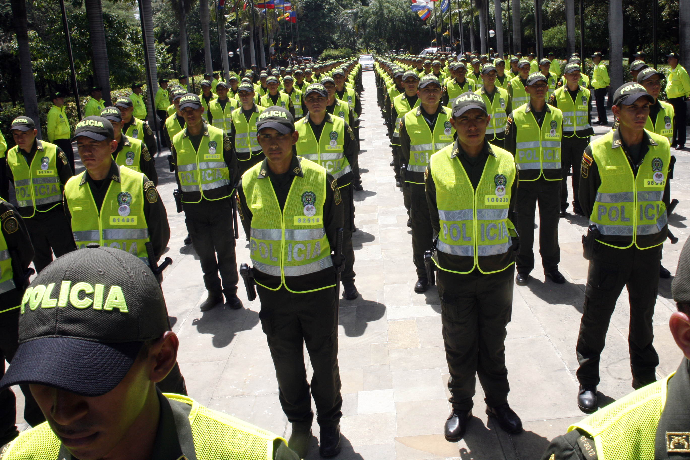 Con 500 nuevos uniformados y el anuncio de la creación de 100 cuadrantes de vigilancia, el Presidente de la República, Juan Manuel Santos, activó la Policía Metropolitana de Santa Marta, con el propósito de intensificar la seguridad y la tranquilidad de los samarios y turistas que visitan la ciudad.